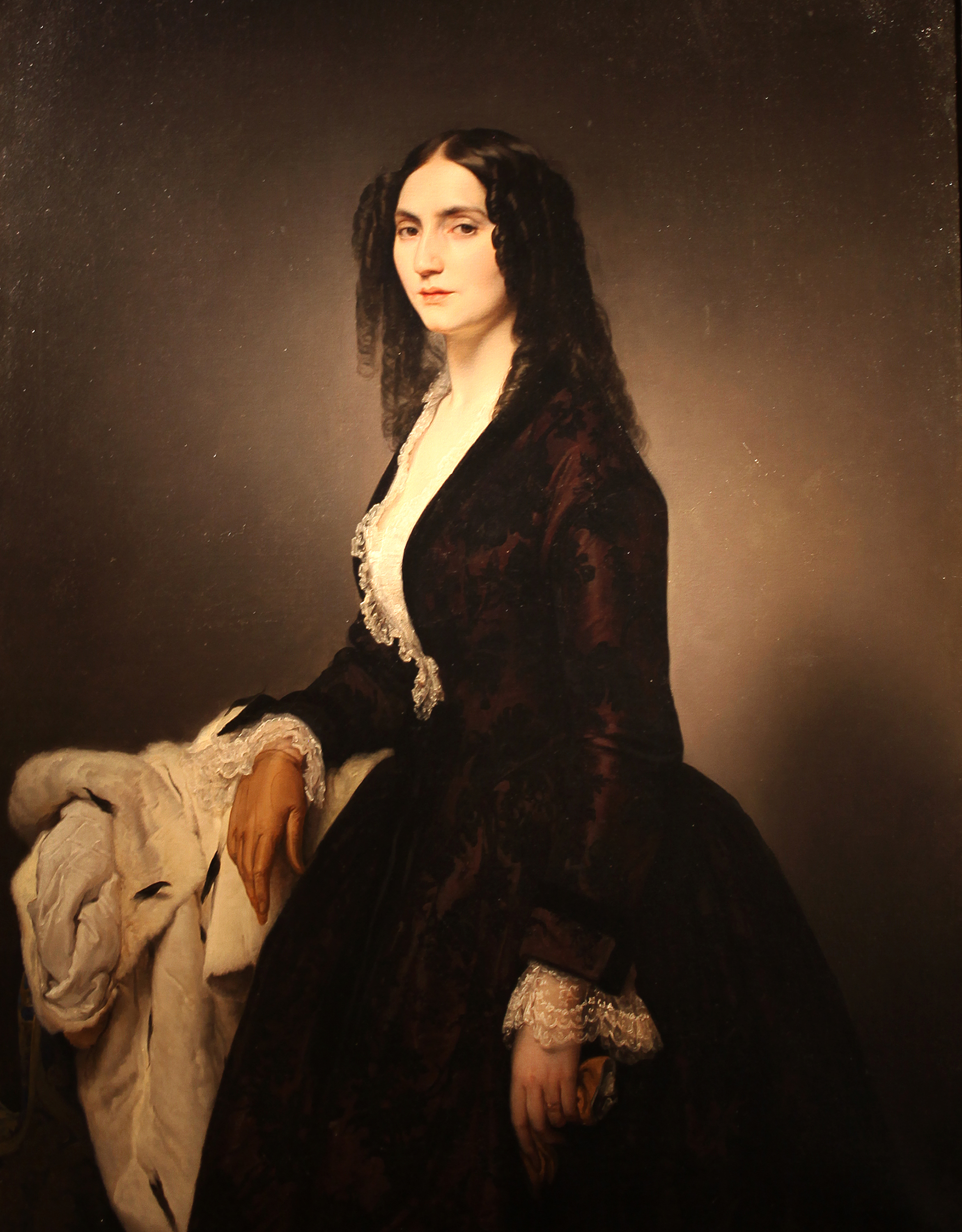 Francesco Hayez (1791-1882) Ritratto di Matilde Juva Branca (1851) Galleria d'Arte Moderna di Milano